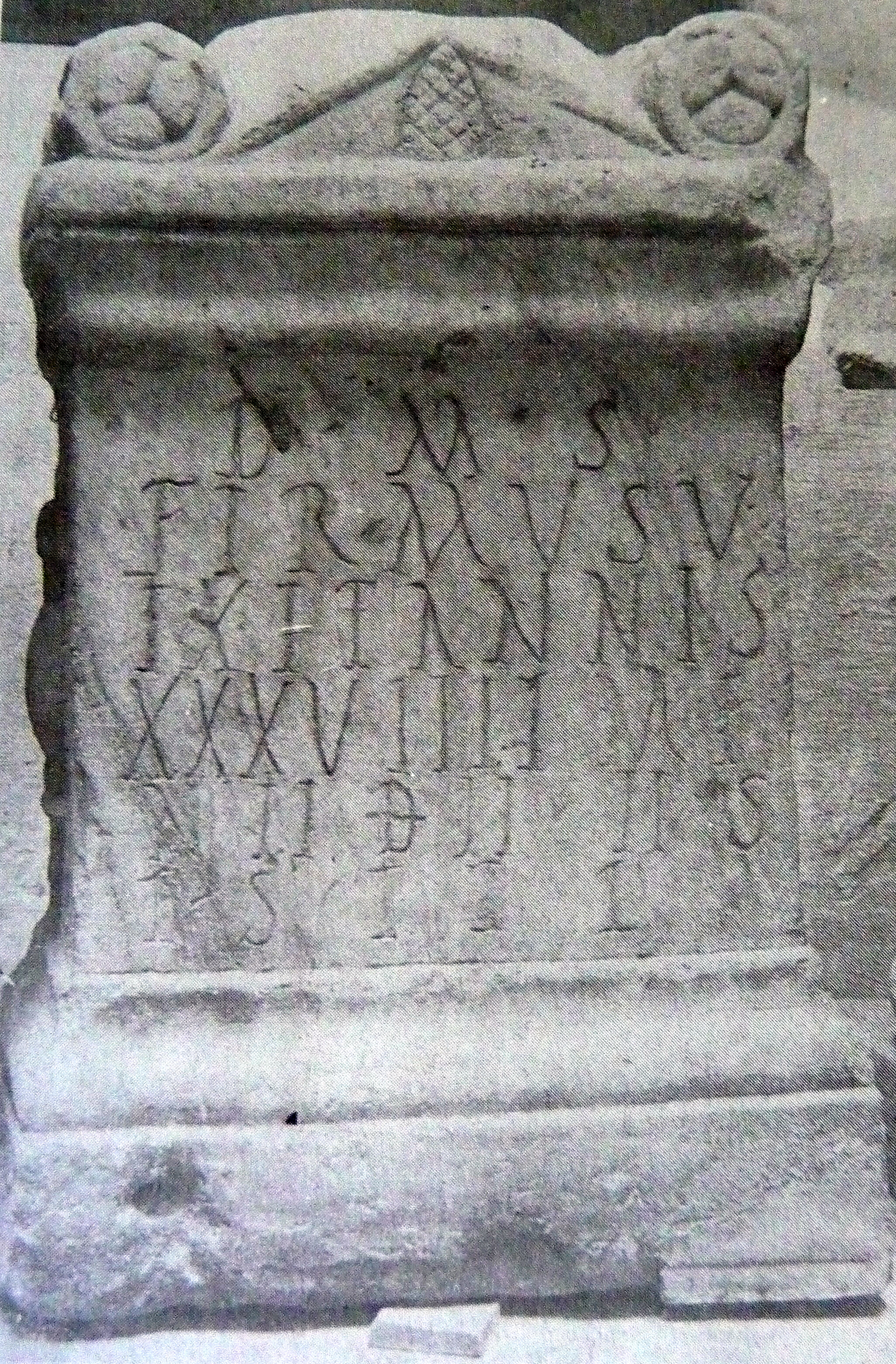 Ara funeraria romana hallado en 1820 en Villarrasa (Huelva, Andalucía), correspondiente a la inscripción CIL II 1269 = II 5352, cuyo texto dice: D(iis)· M(anibus)· S(acrum)/FIRMVS V/IXIT ANNIS/ XXXVIIII ME/N(is) II D(ies) II· H(ic)· S(itus)/ E(st)· S(it)· T(ibi)· T(erra)· L(evis).